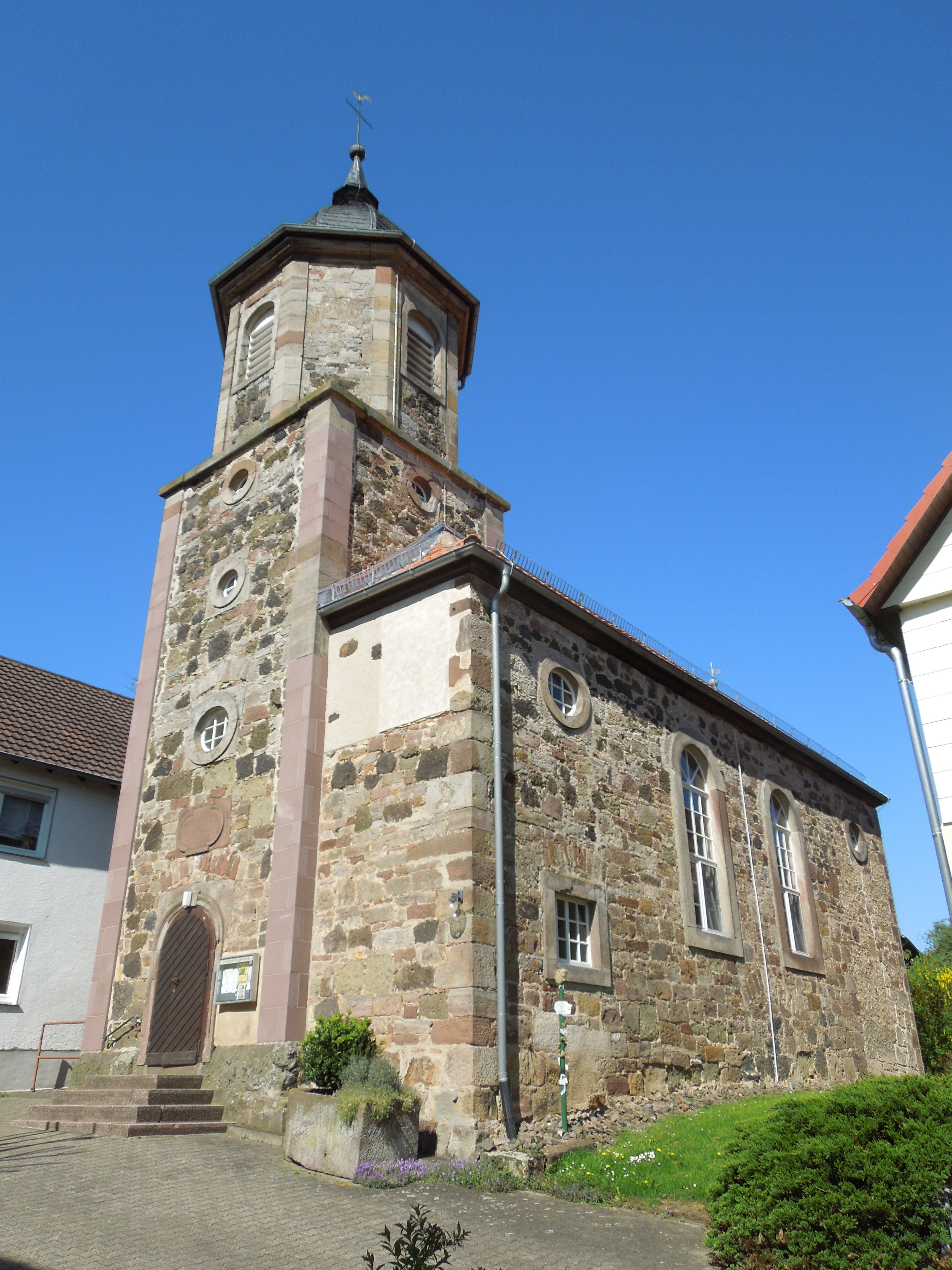 Die evangelische Dorfkirche im Gudensberger Stadtteil Gleichen